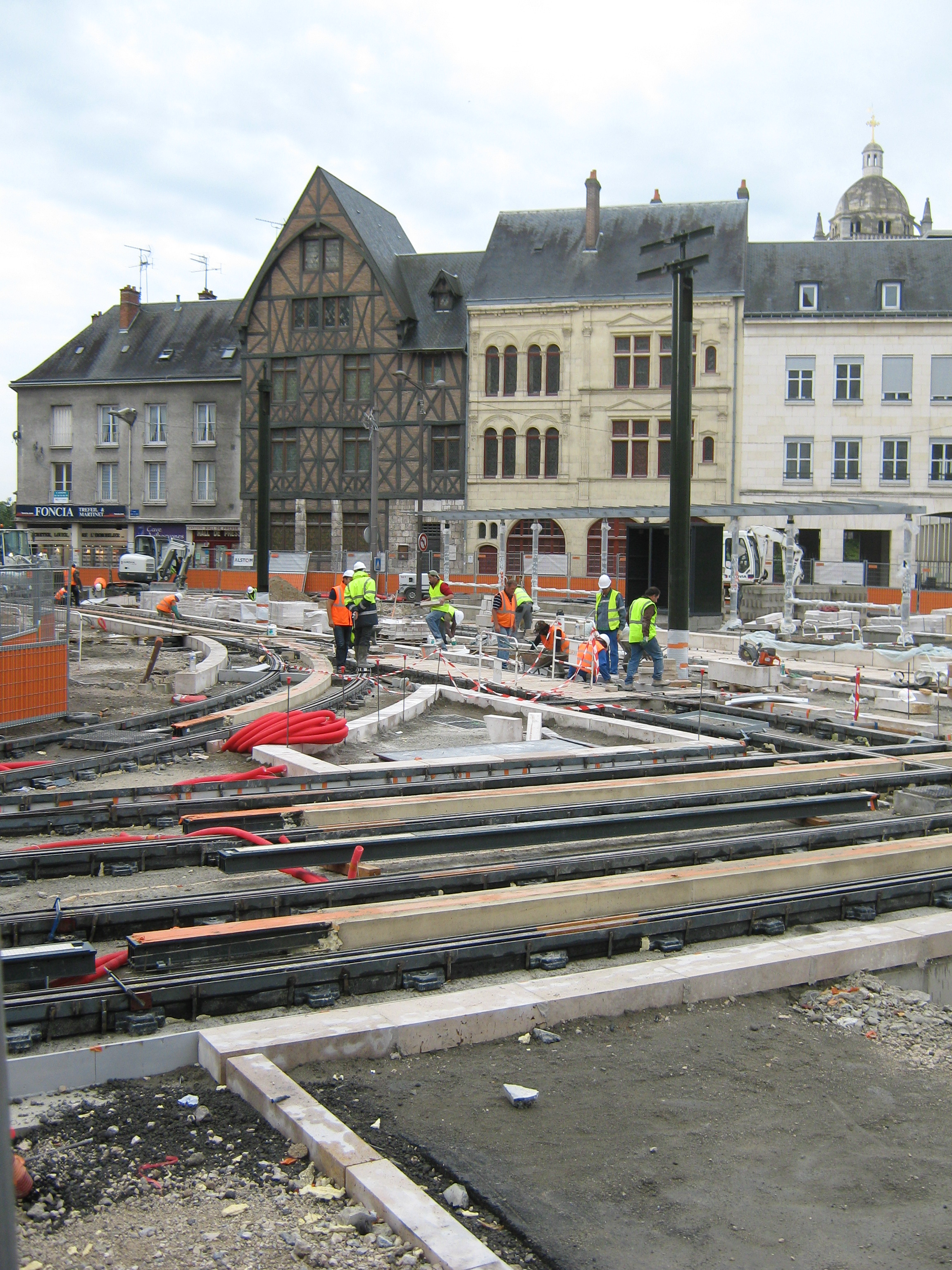 Chantier de l'interconnexion entre les lignes A et B du tramway d'Orléans place De Gaulle. À l'arrière-plan, la maison de Jeanne d'Arc et le Service d'architecture et du patrimoine